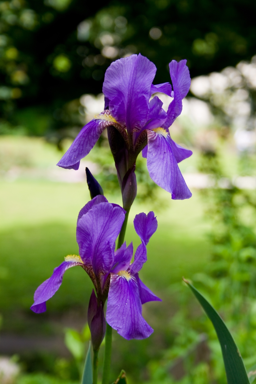 Hrvatske perunike snimljene u Botaničkom vrtu u Zagrebu.